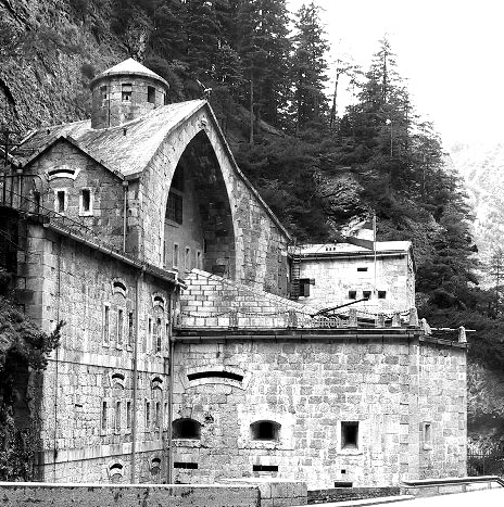 Straßensperre Nauders von Süden (vom Reschenpass), Tirol, Austria.